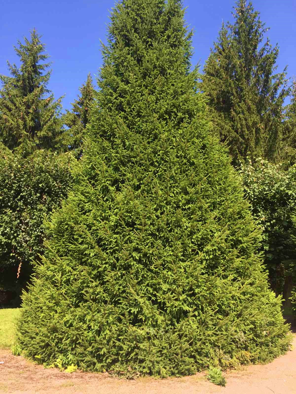 Spruce in the park of Peterhof